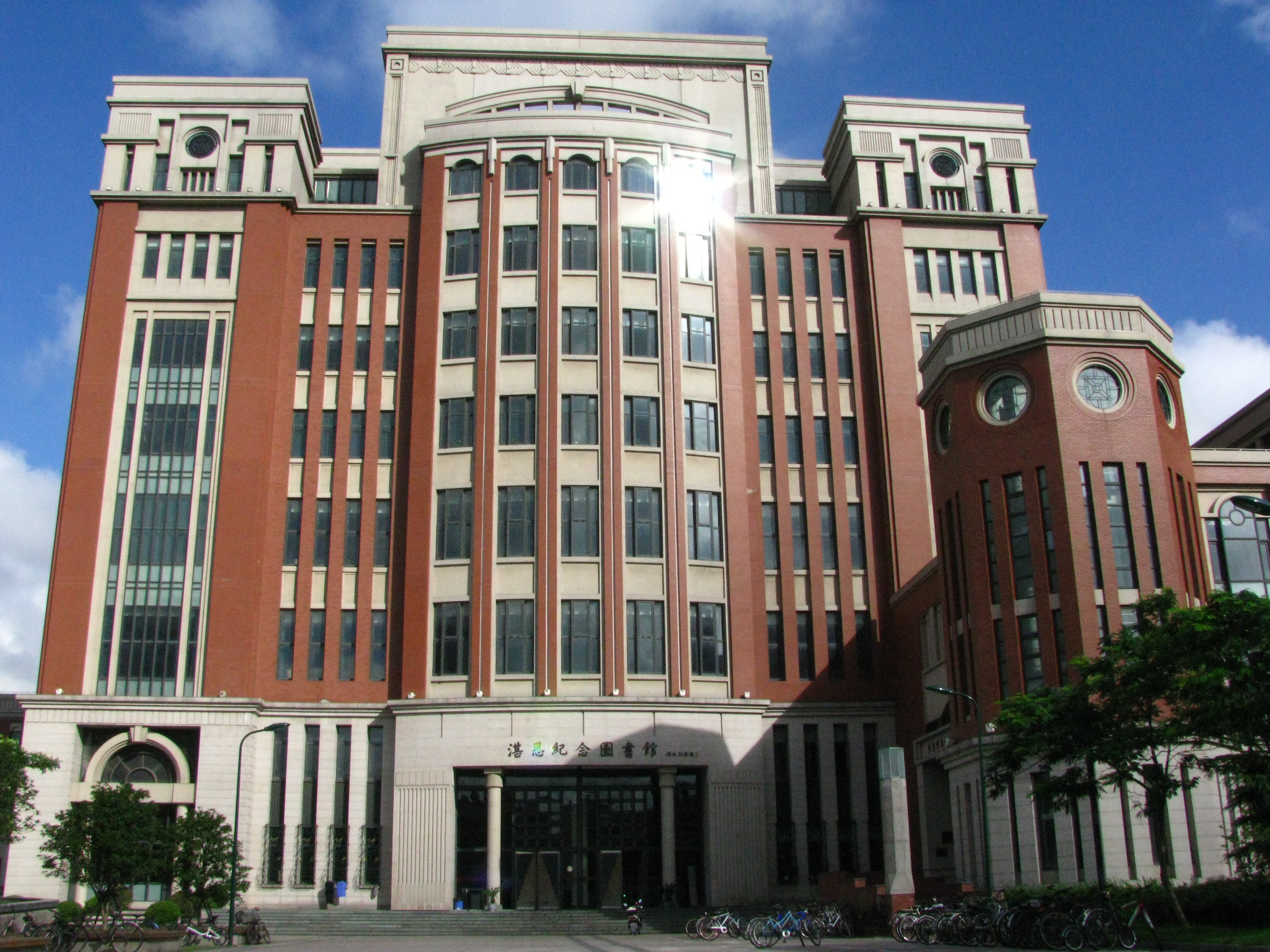 上海理工大学图书馆